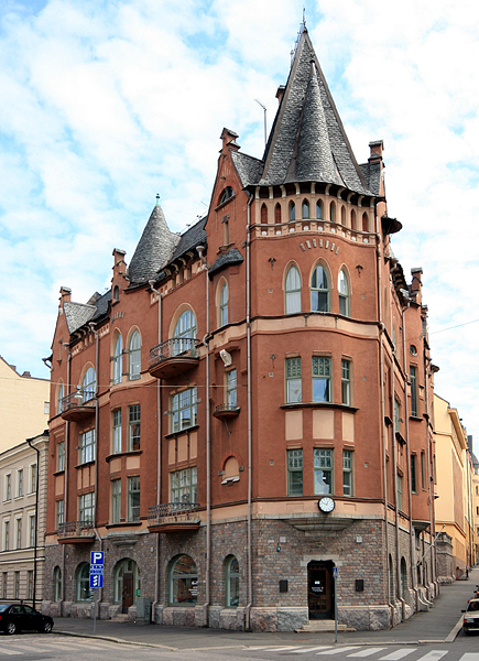 Tallbergin talo, Luotsikatu 1, Katajanokka, Helsinki.